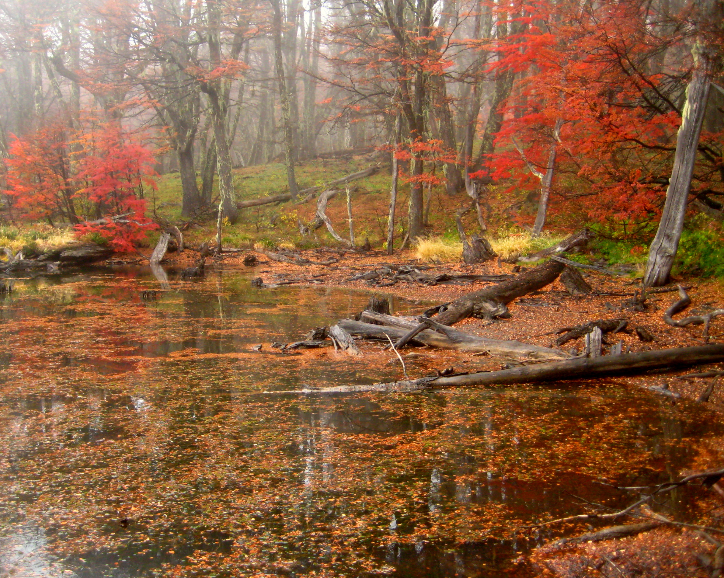 Bariloche - Valle del Chalhuaco